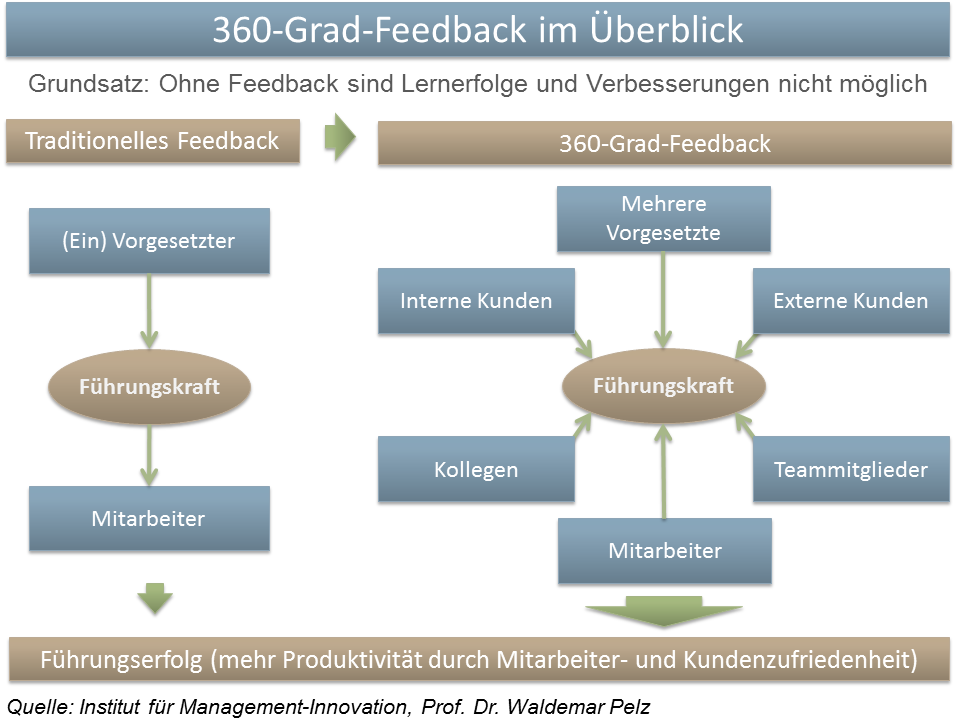 360-Grad-Feedback im Überblick